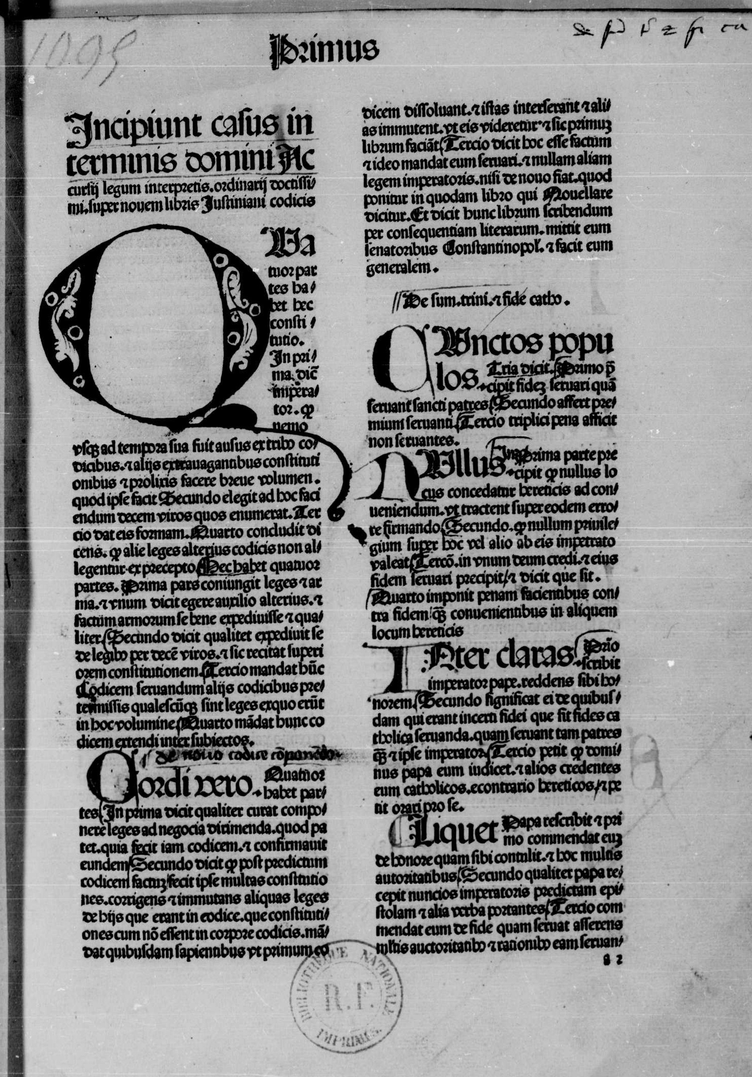 carta a1v